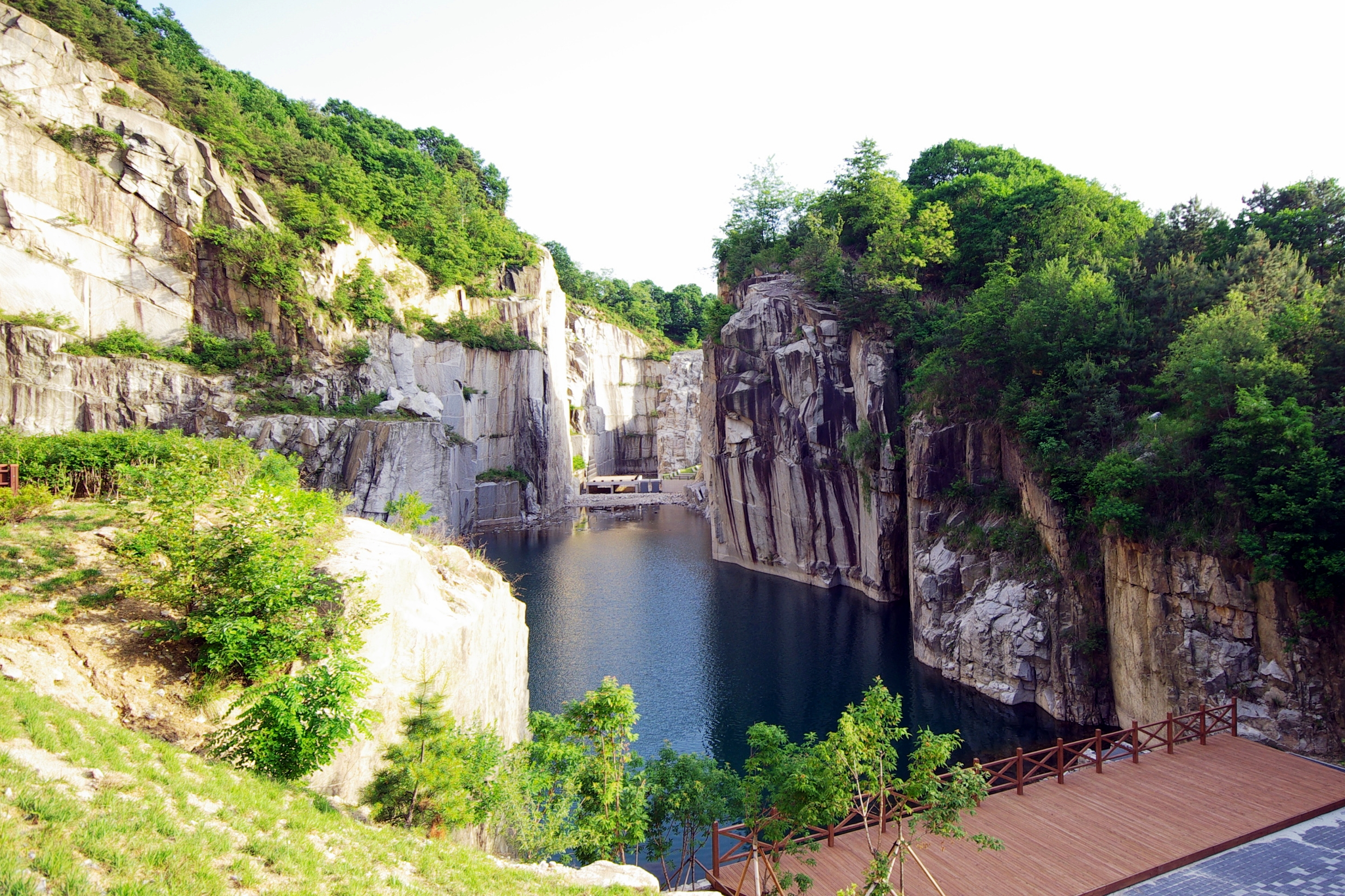 천주호 전경